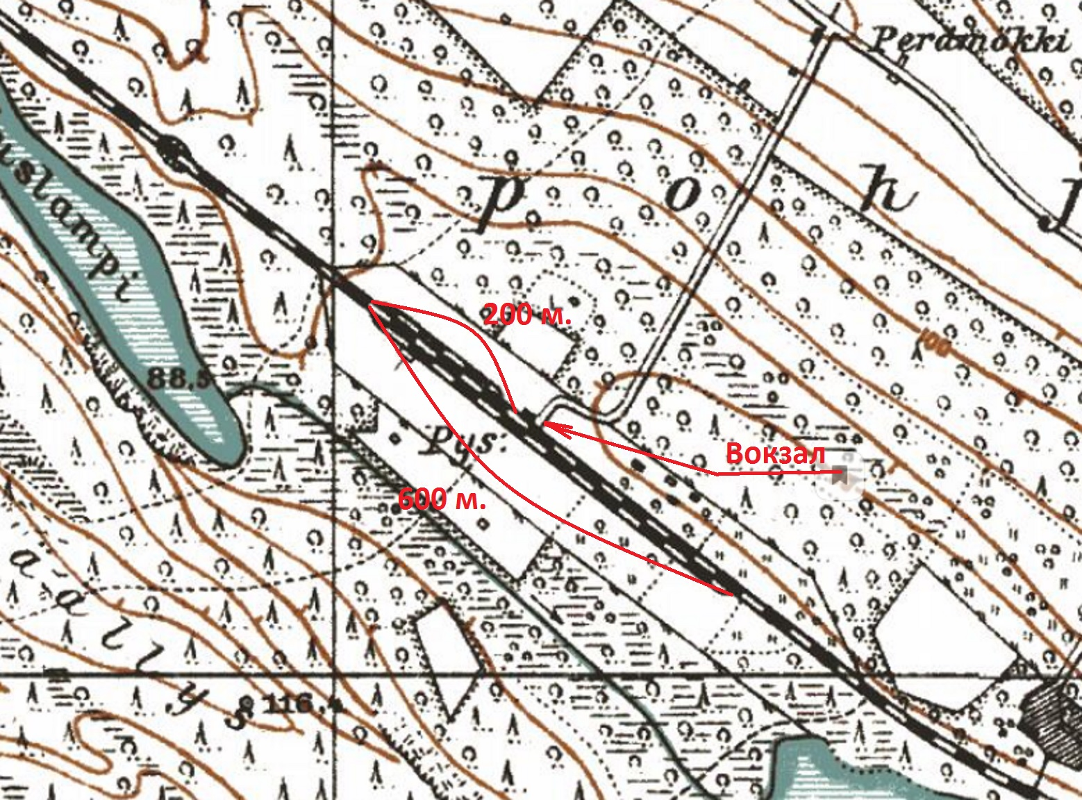 Пирттипохья.